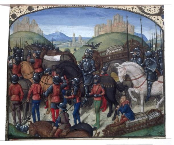 Vespasien machant contre les juif, miniature d'un exemplaire anonyme de 'La guerre des Juifs' de Flavius Joseph - Traduction anonyme - Bruge XVe siècle Shémas mettent en évidence les renforts métaliques des jaques de 2 des fantassins à l'adresse Vespasien_marchant_contre_les_juif_XVE_Siècle_shemas.JPG